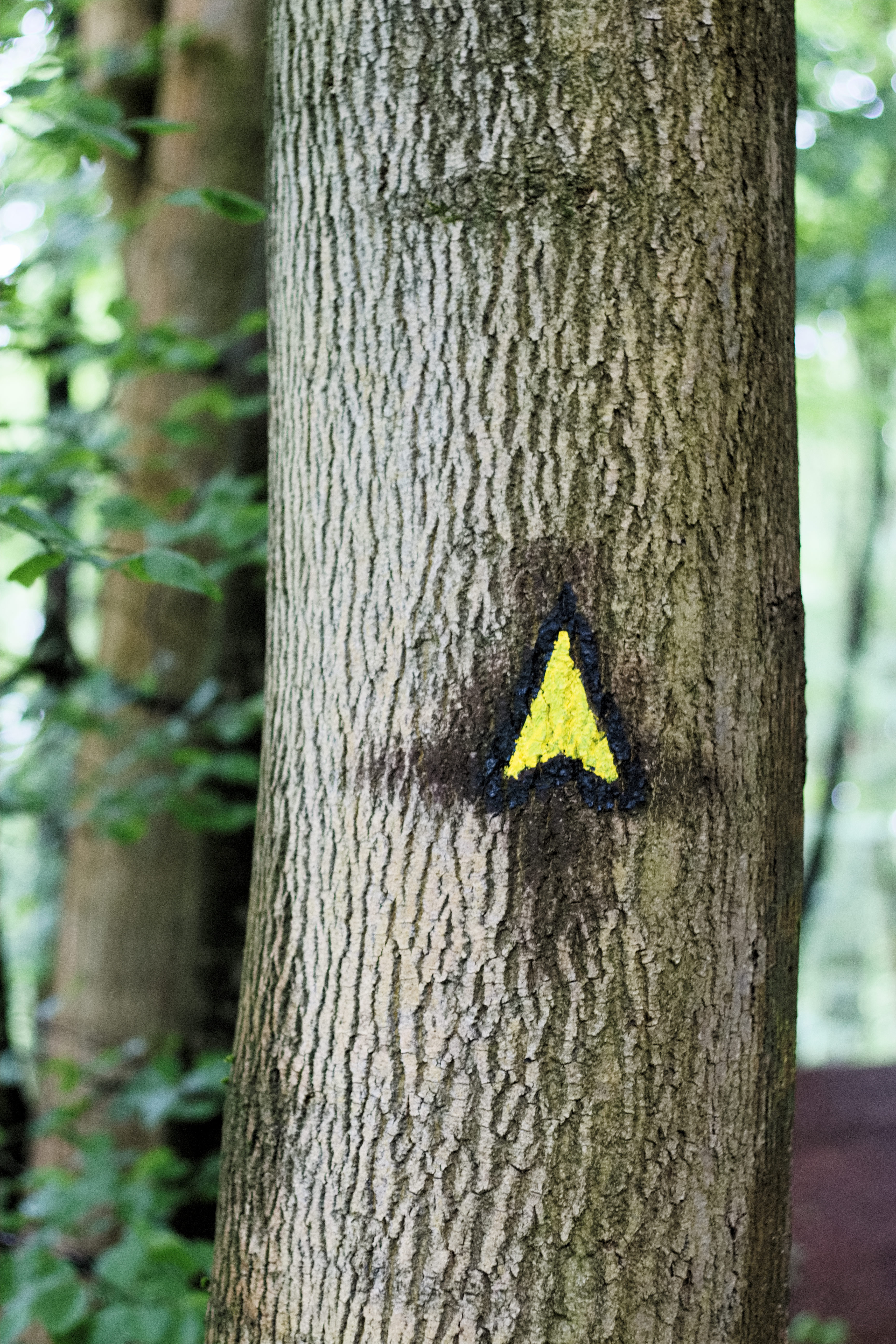 Hamburg - Alstertal: Markierung des Alsterwanderwegs